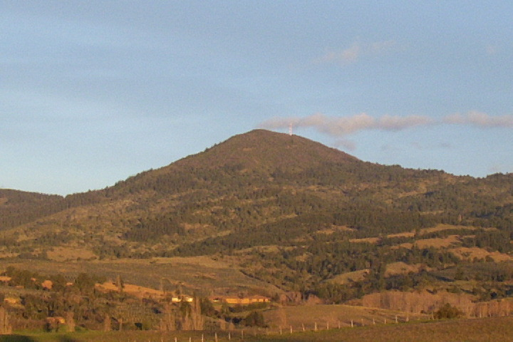 Ninhue, Biobío, Chile